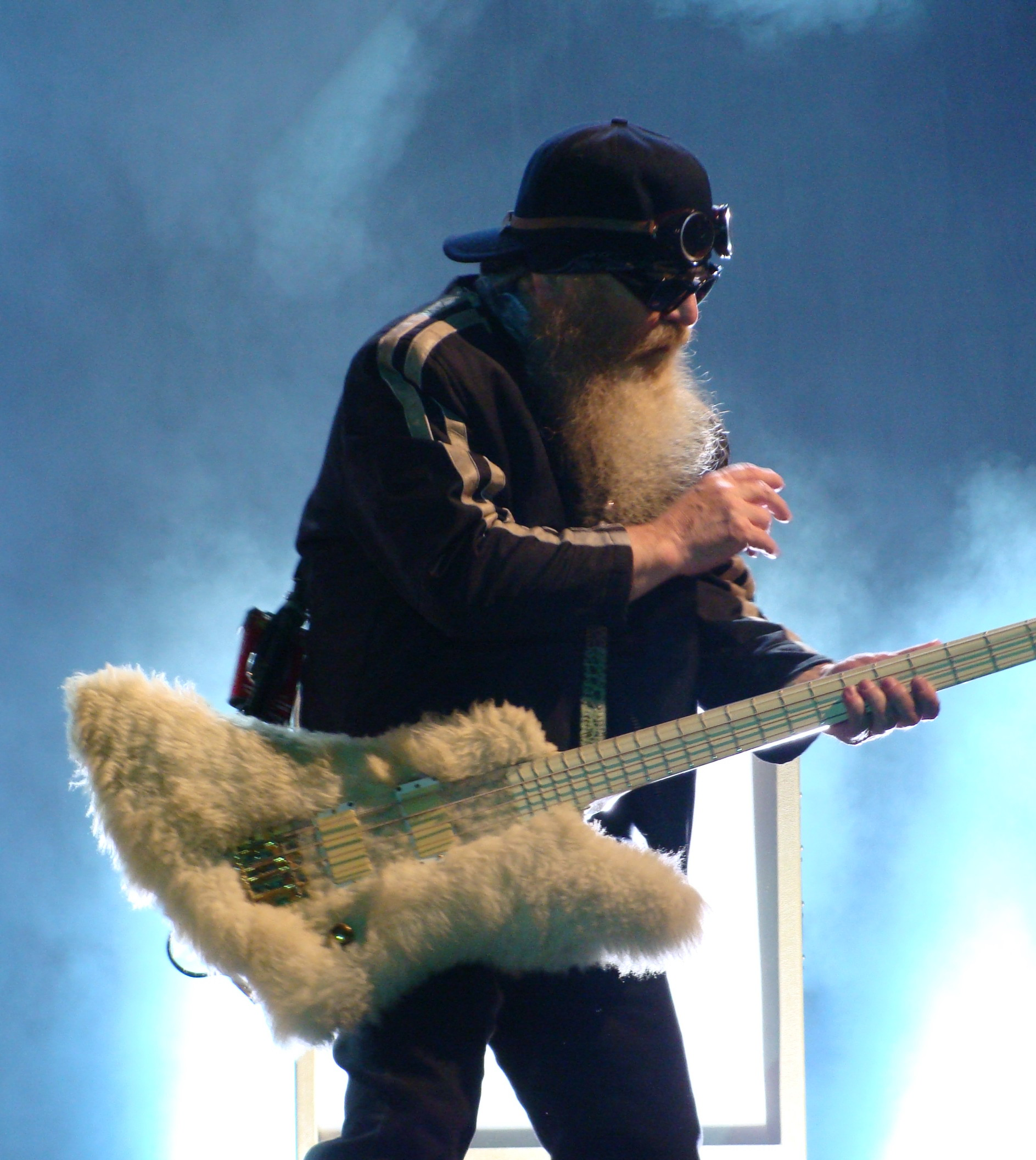 Dusty Hill, en un concierto de ZZ Top en el Bilbao BBK festival 2008.